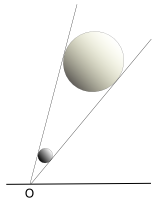 AUTHOR: Francisco Javier Blanco González FROM: España -Spain- IMAGE: diámetro angular de cuerpos celestes de distinta dimensión MADE by Inkscape